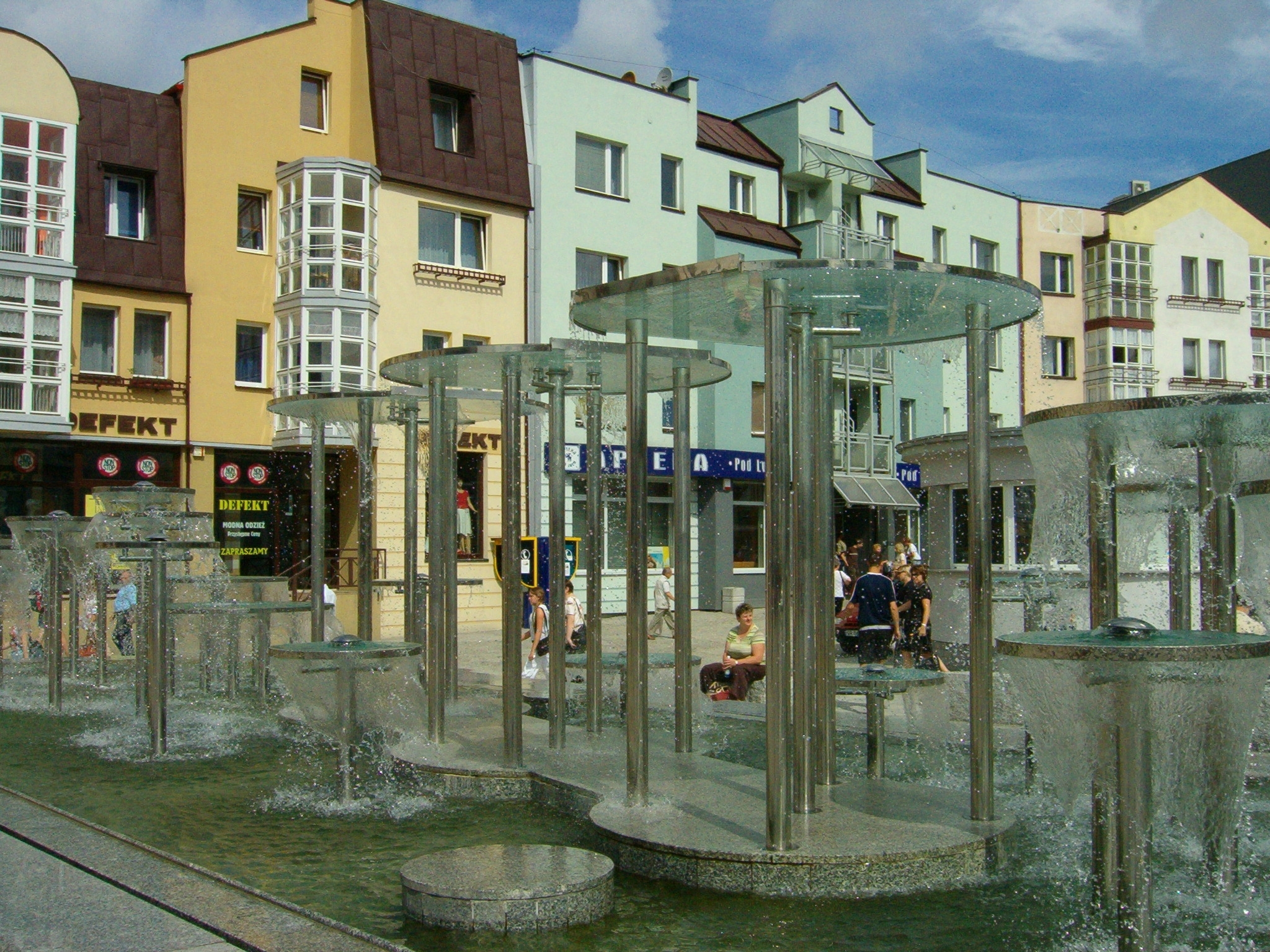 Fontanna na Placu Wolności w Rybniku